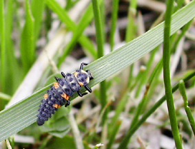 larve de coccinelle (stade 3 ou 4) - France, juin 2003